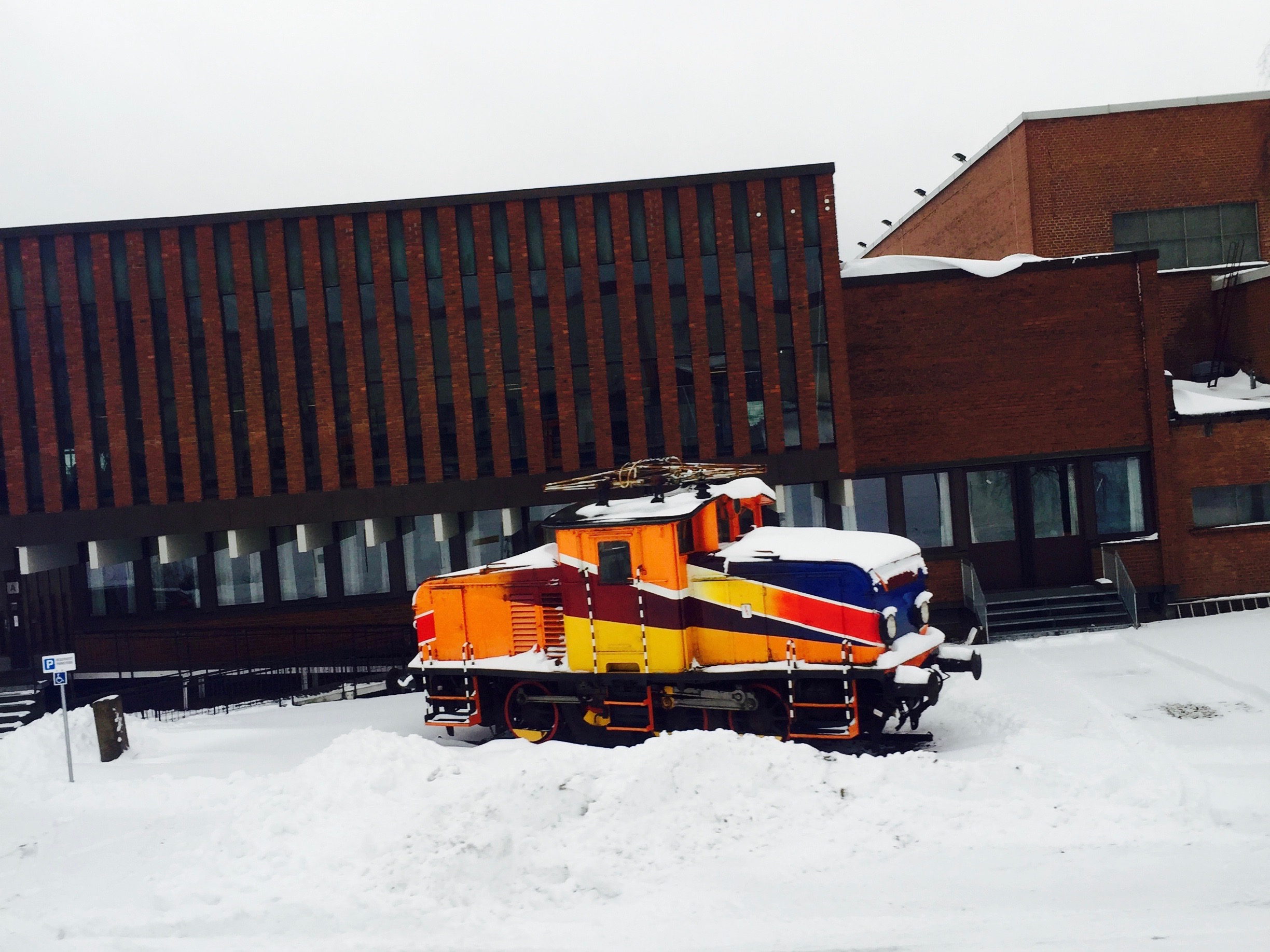 Lokomotiv til Sesam tog